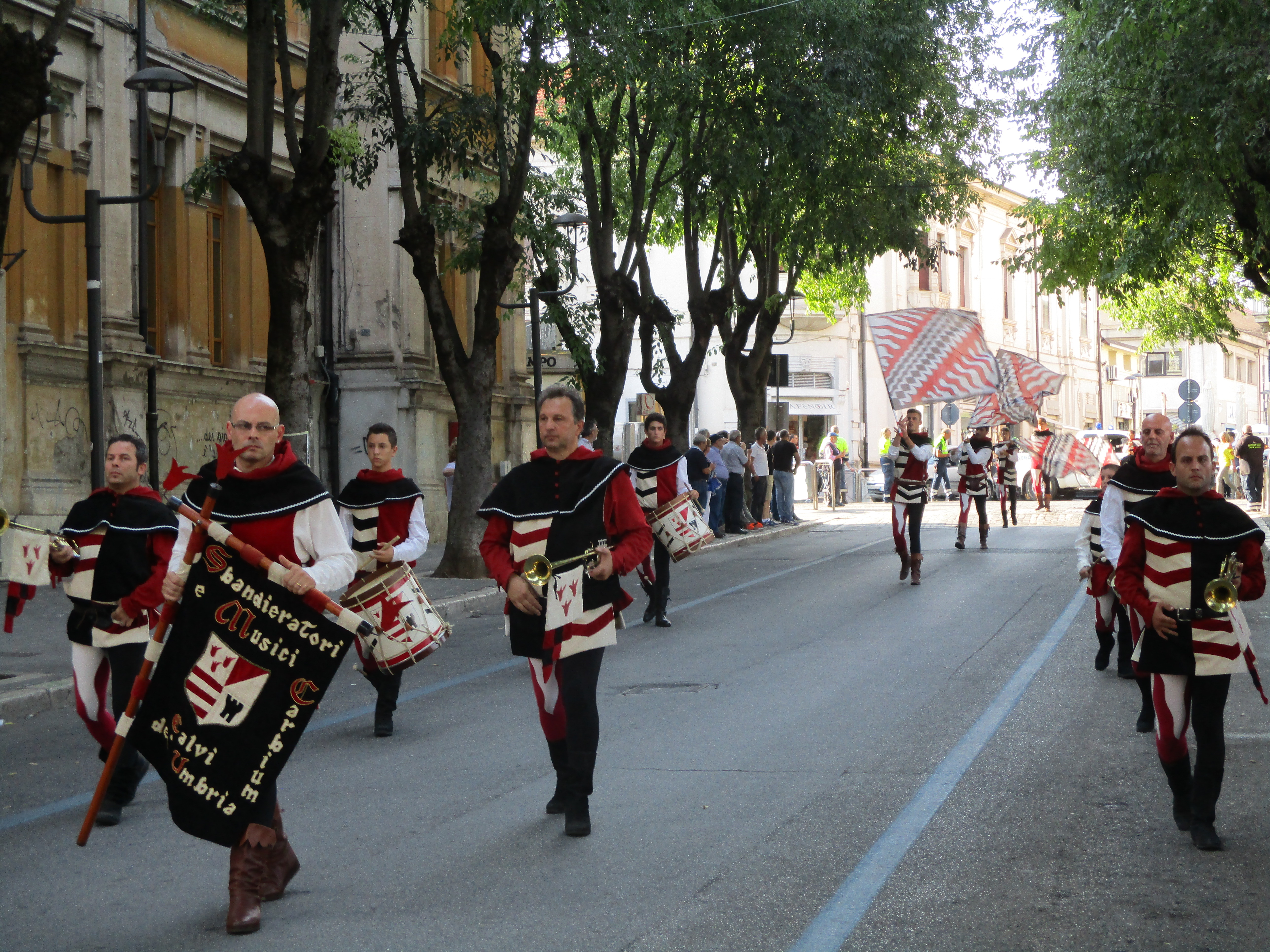 Sbandieratori e musici di Calvi dell'Umbria ad Avezzano